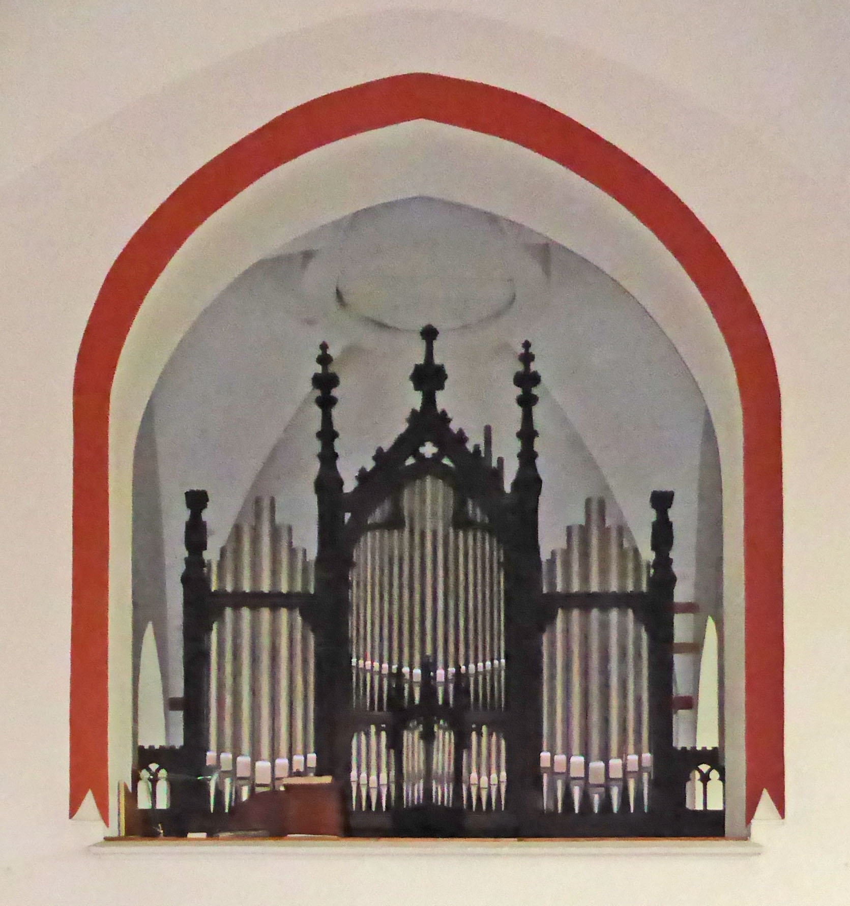 Eggert-Orgel der katholischen Kirche St. Johannes der Täufer in Burg bei Magdeburg.